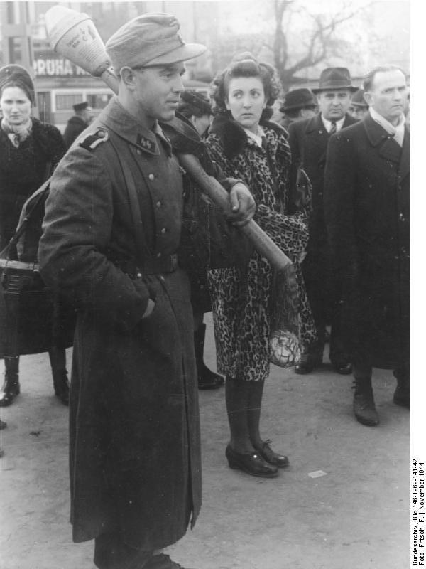 Budapest November 1944 Für 30 Filler in die Hauptkampflinie! Hinter dem starken Speergürtel, den deutsche und ungarische Einheiten um die Hauptstadt Budapest gelegt haben, geht das Leben unbehindert weiter. Nur wenige Kilometer von der Stadt entfernt zieht sich die Hauptkampflinie entlang, an der sich die Bolschwisten immer wieder blutige Köpfe holen. Mit der normal verkehrenden Strassenbahn kann man bis zu den rückwärtigen Posten der Sicherungslinie fahren, ein Zustand, der wohl einmalig in der Geschichte dieses Krieges ist. Mit der Panzerfaust bewaffnet, warten Grenadiere neben Zivilisten an der Haltestelle. SS-PK- F. Fritsch